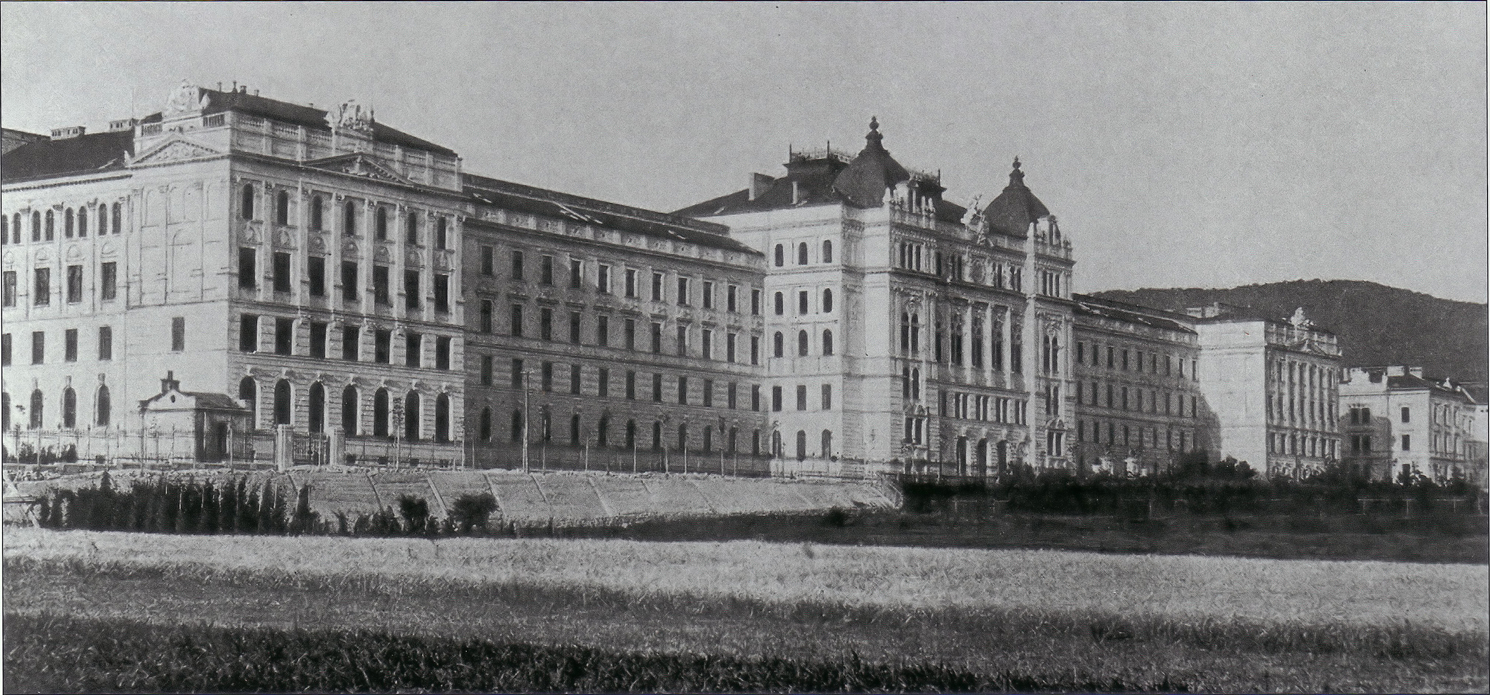 Ansicht der k.u.k Technischen Militärakademie aus dem Jahr 1904